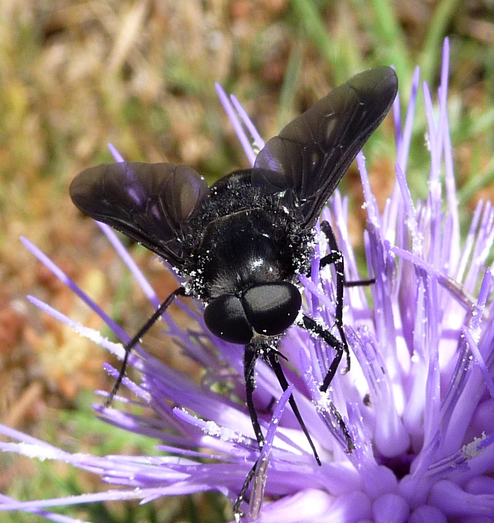 Pangonius sp